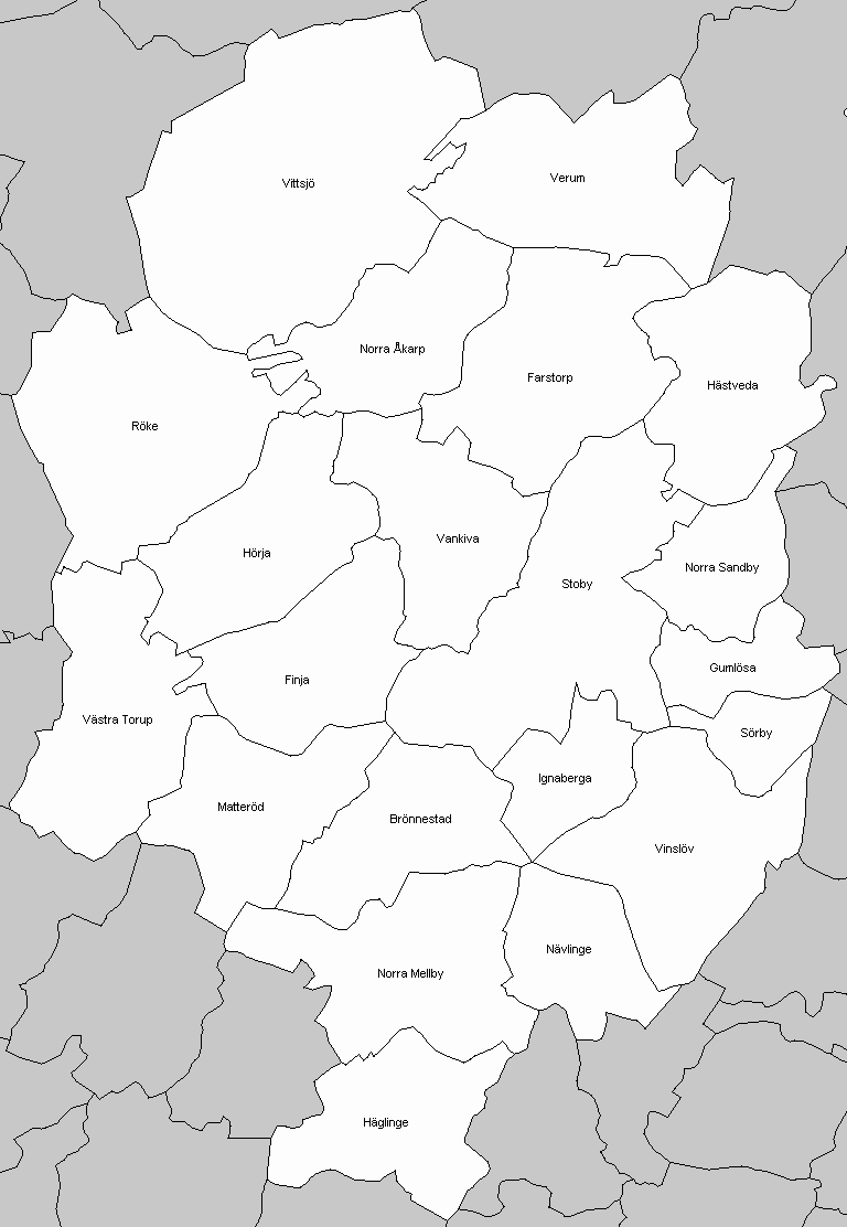 Socken in Hässleholm